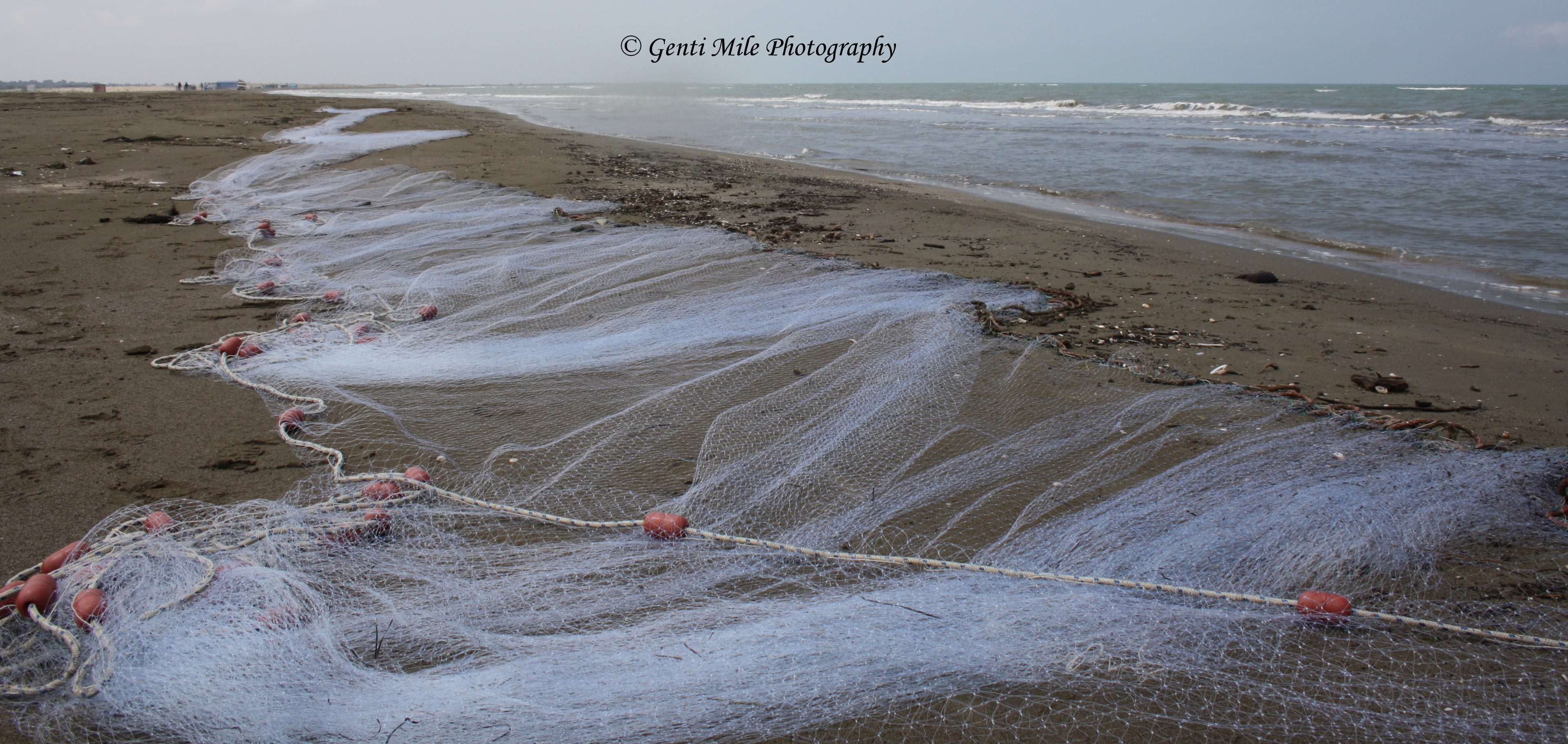 Divjake-Karavasta, Lushnje,Fier, Kavaje